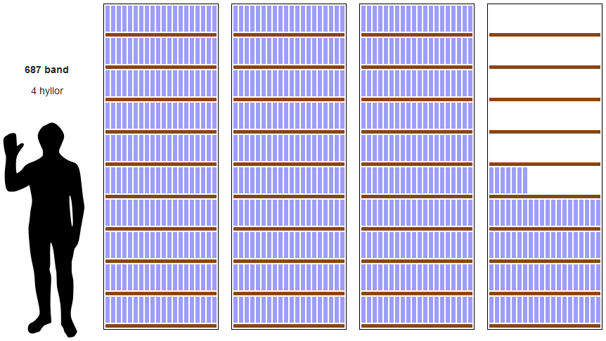 Så här skulle svenskspråkiga Wikipedia se ut som inbundna band, maj 2018. Skärmdump från.